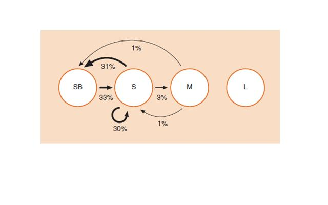 Cycle de vie chardon perché avec calcul élasticité